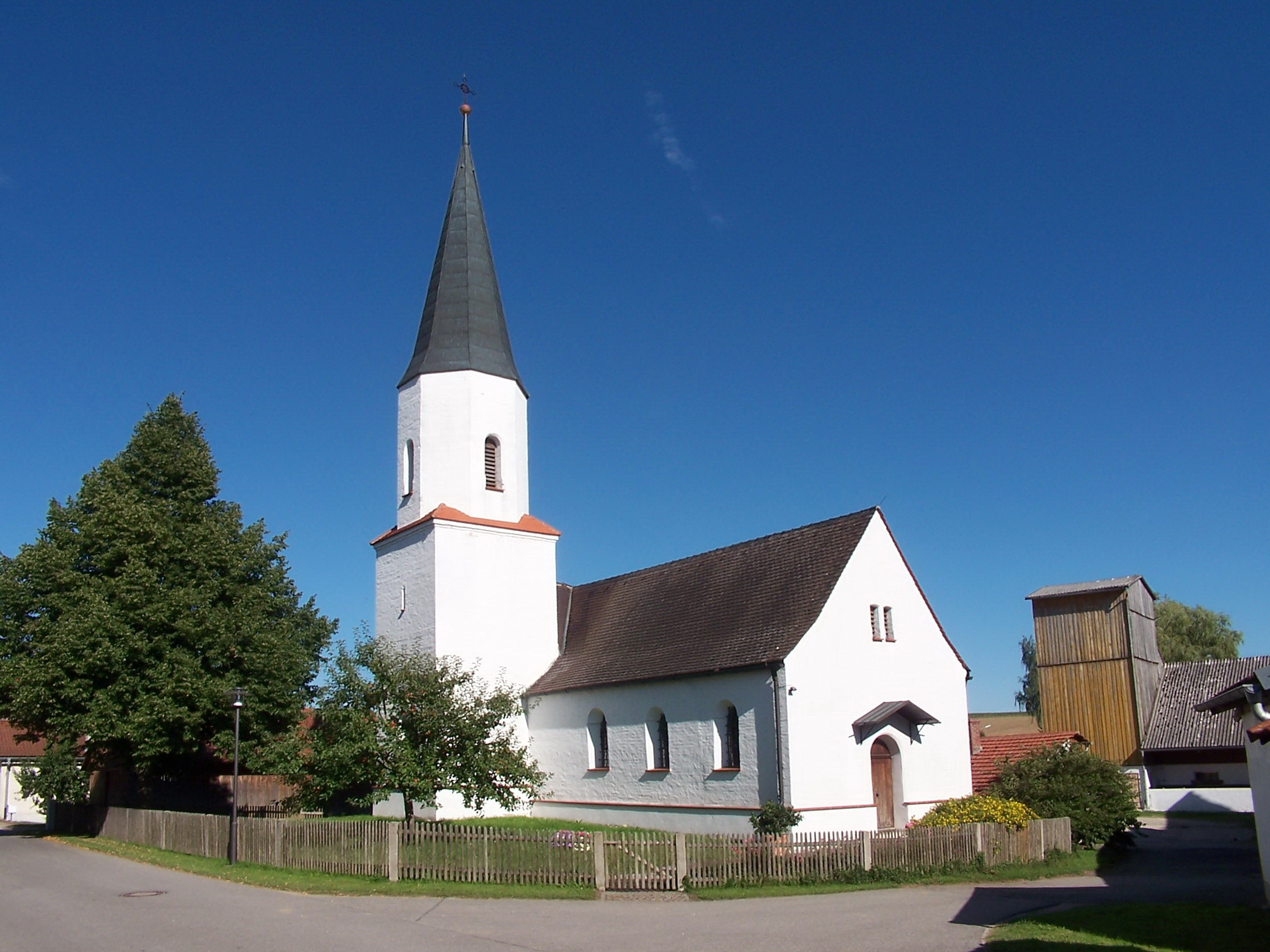 Egglhausen 16. Kirche St. Nikolaus. Backsteinbau, 15. Jh.; mit Ausstattung.